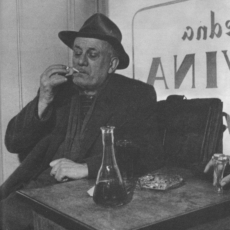 Hrvatski pjesnik Tin Ujević u kavani. (Croatian poet Tin Ujević in a caffe.)